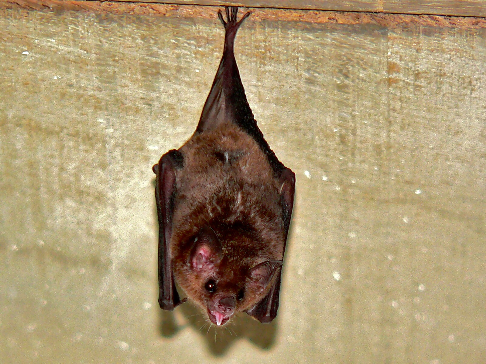 La Casona, Santa Rosa NP, COSTA RICA